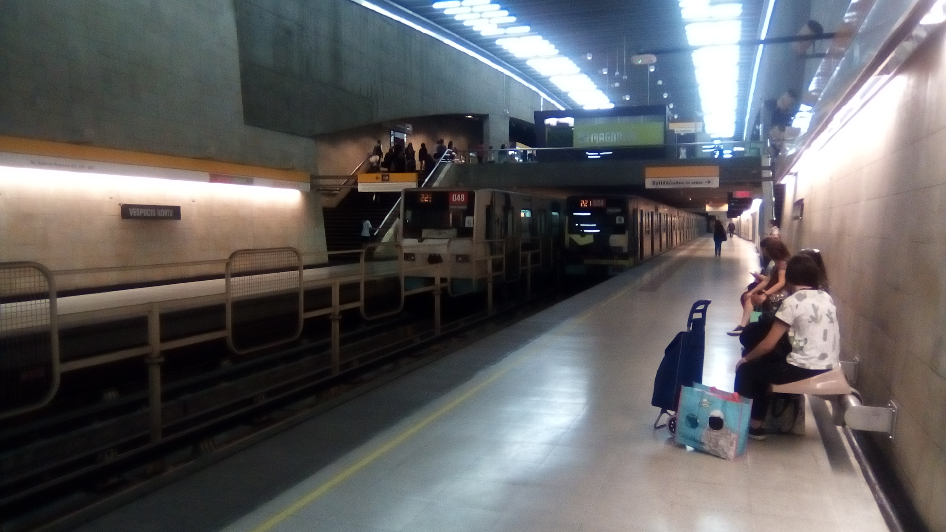 Estación Vespucio Norte (2018)